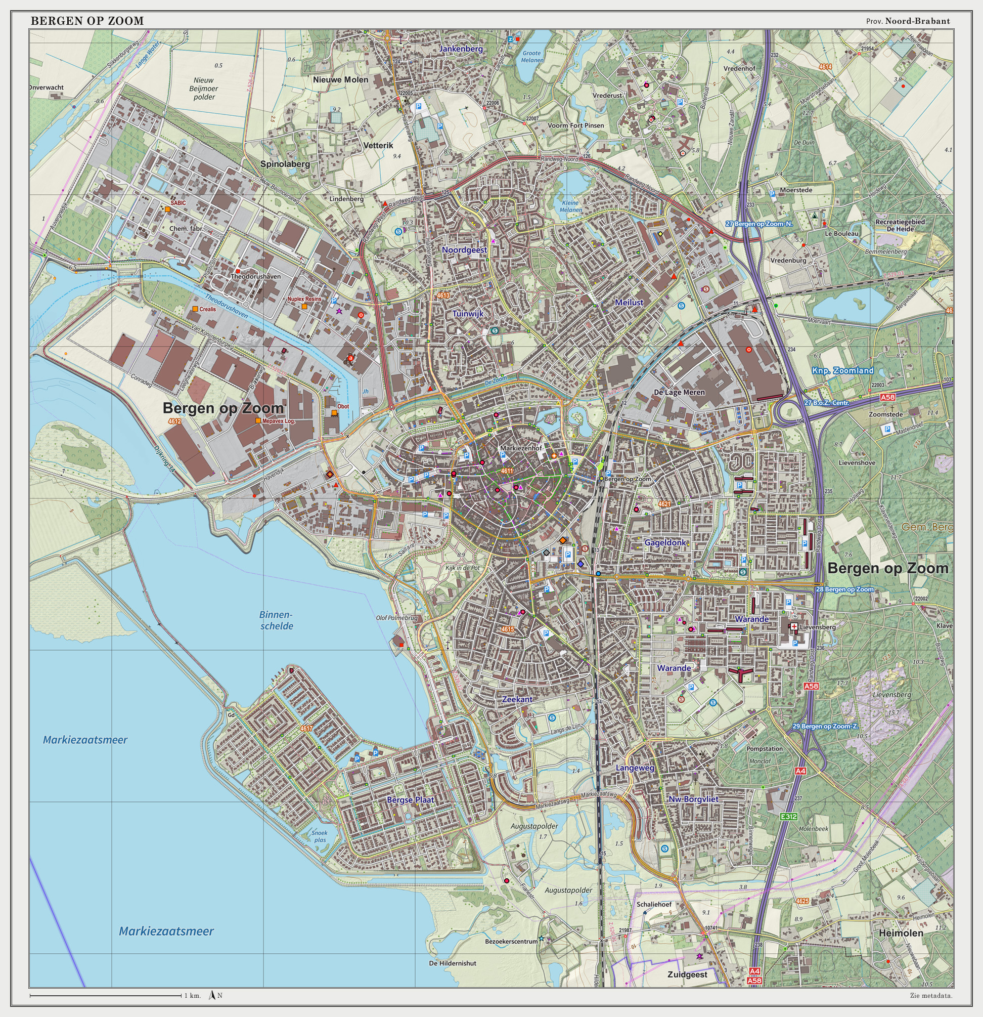 Topografische kaart van Bergen op Zoom (woonplaats). Resolutie: 300 pixels/km. Kaartbeeld samengesteld uit de open geodata van de Top10NL en Top25namen (Basisregistratie Topografie, Kadaster), Creative Commons BY licentie. Gebouwvlakken uit open geodata BAG extract. Wegen uit de OpenStreetMap. Reliëfschaduw uit de Actuele Hoogtekaart AHN2. Samenstelling en kleurenschema: Jan-Willem van Aalst, met QGIS2. Zie ook de Legenda.